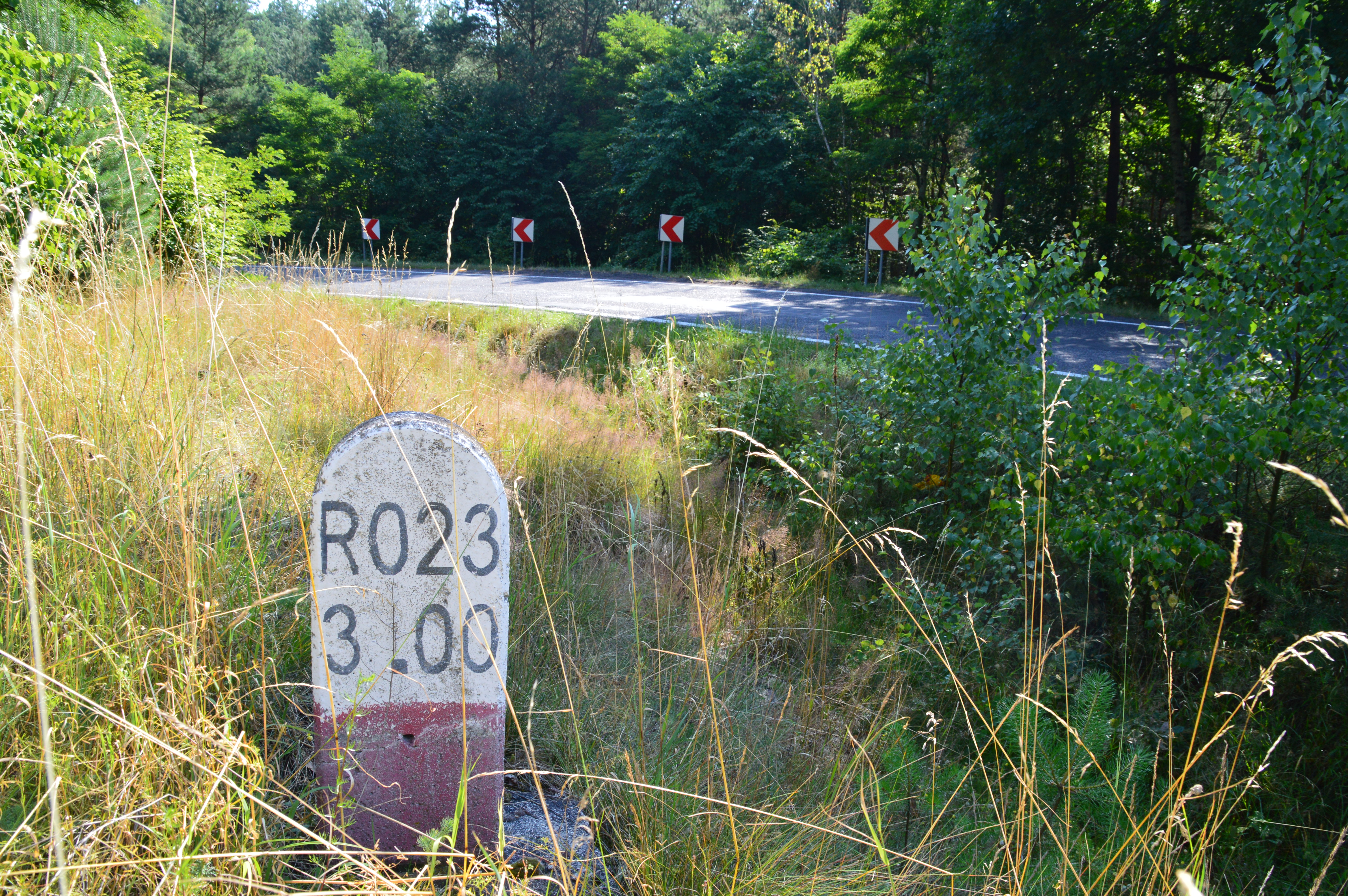 Świadek punktu referencyjnego na Drodze Wojewódzkiej 328